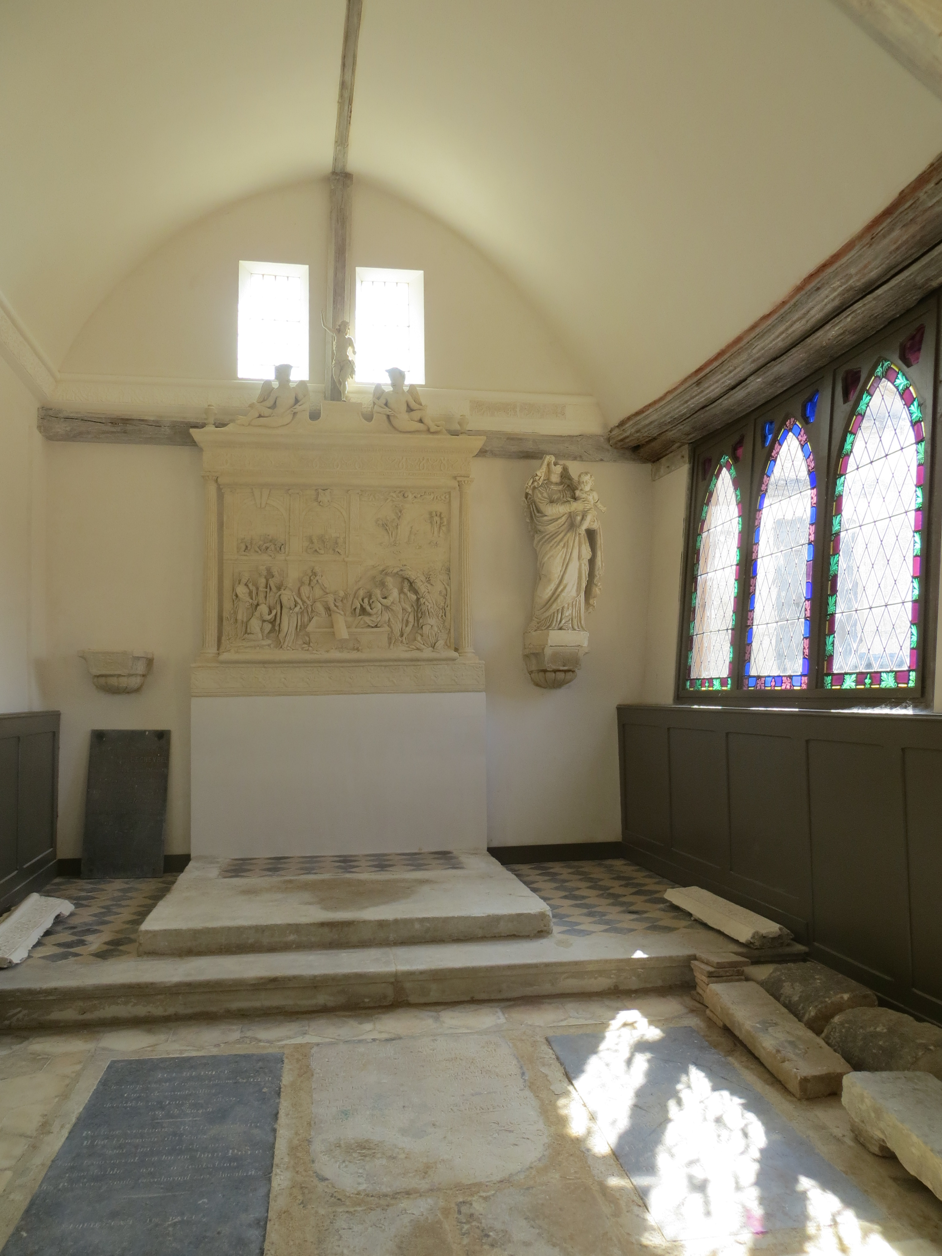 Intérieur de la chapelle de l'aître de Brisgaret avec le retable de St Lazare